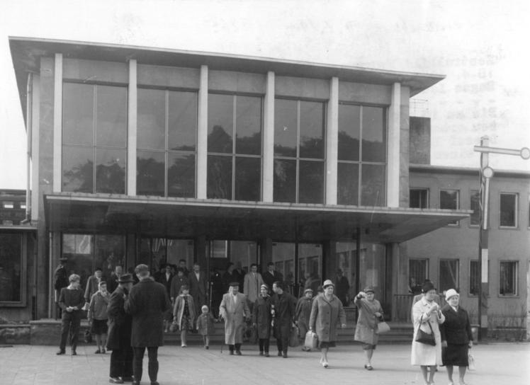 Zentralbild-Brüggmann Kr-Ki. 18.4.1963 Reges Leben herrscht auf dem Hauptbahnhof Potsdam Bis zu 10000 Reisende werden täglich auf dem neuerbauten Hauptbahnhof Potsdam abgefertigt. Dieser Bahnhof entwickelte sich in den letzten Jahren zu einem wichtigen Schnittpunkt im Reiseverkehr. So können jetzt schon Reisende von Potsdam aus z.B. nach Stralsund, Rostock, Karl-Marx-Stadt oder Magdeburg u.a. Städte fahren. Bis Ende 1963 soll mit den letzten Arbeiten an dem modernen Bahnhof abgeschlossen werden.